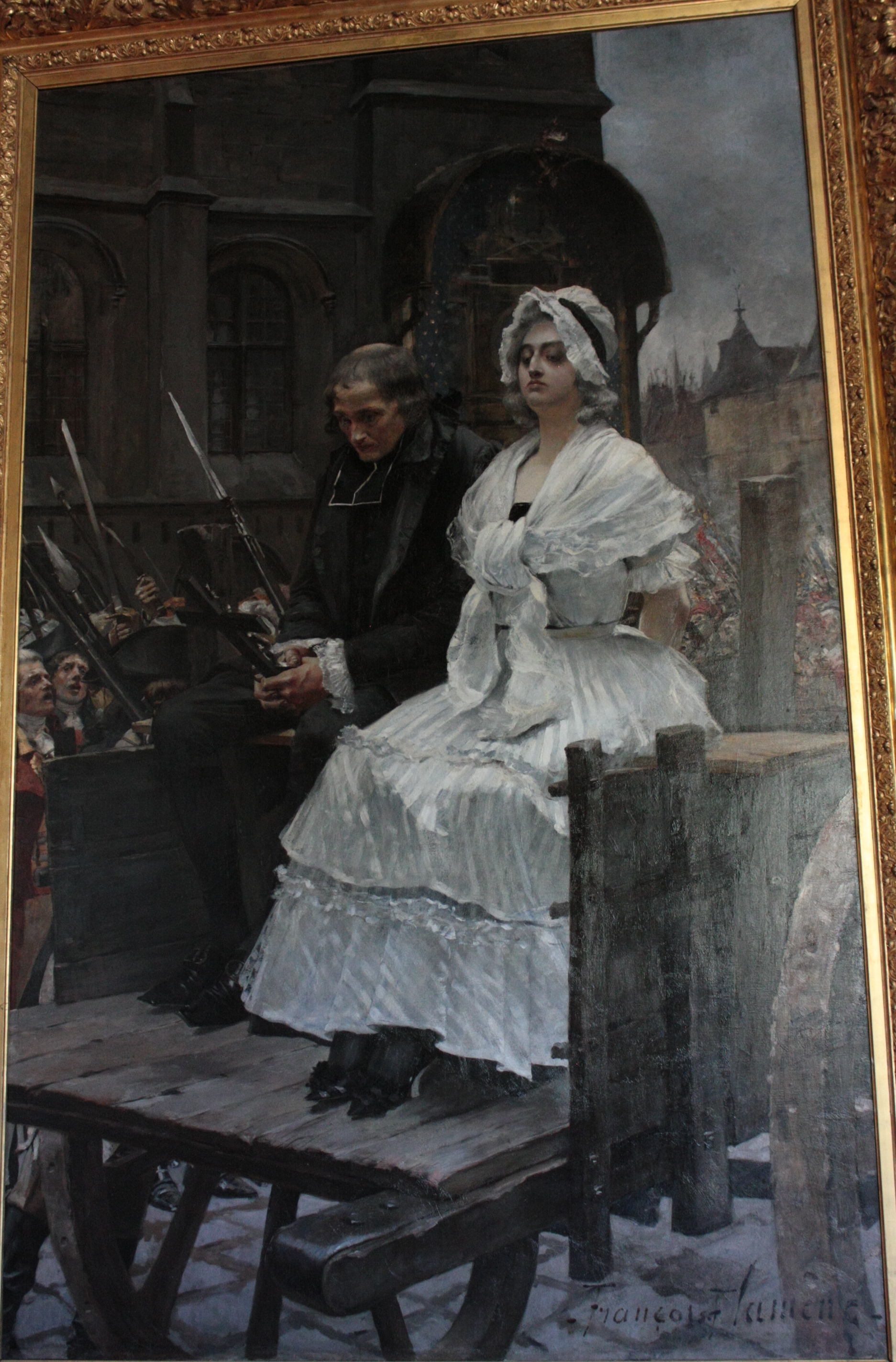 Marie-Antoinette se rendant au supplice par François Flameng, 1885